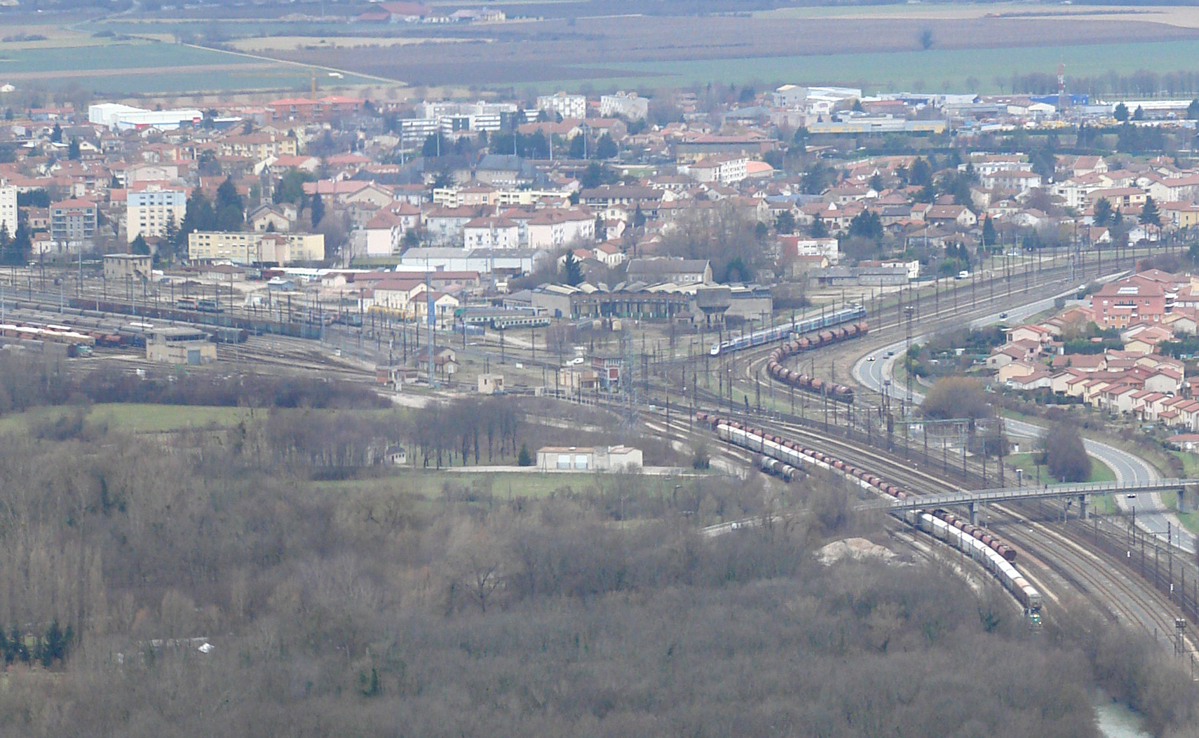 La gare d'Ambérieu-en-Bugey